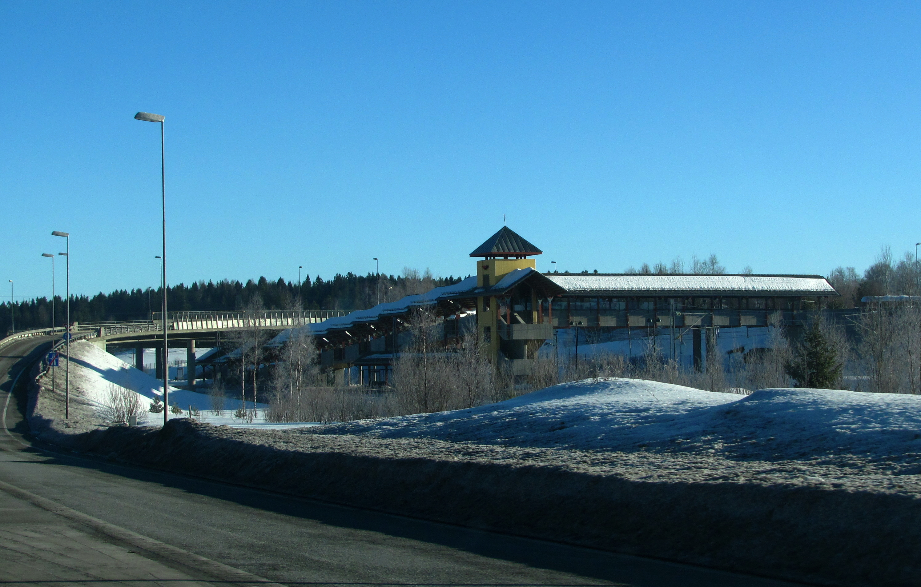 Sonsveien stasjon i Vestby sett fra E6. Østfoldbanens vestre linje.